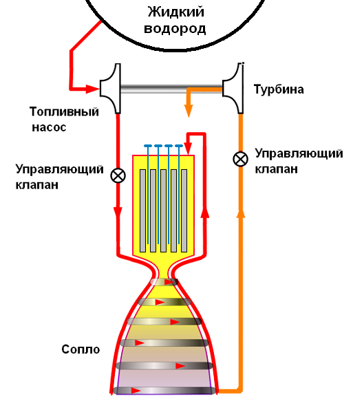 Схема ТЯРД